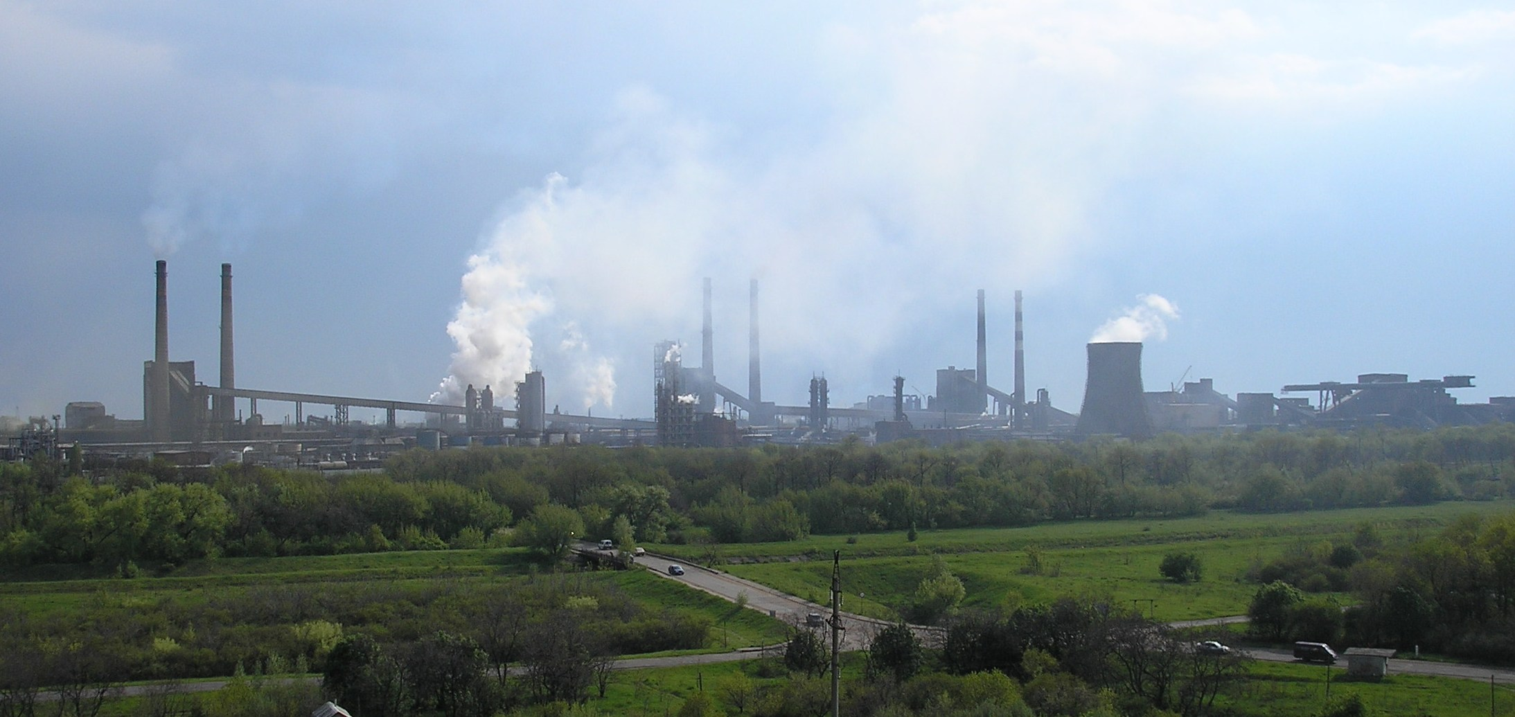 Ясинівський коксохімзавод (Макіївка)